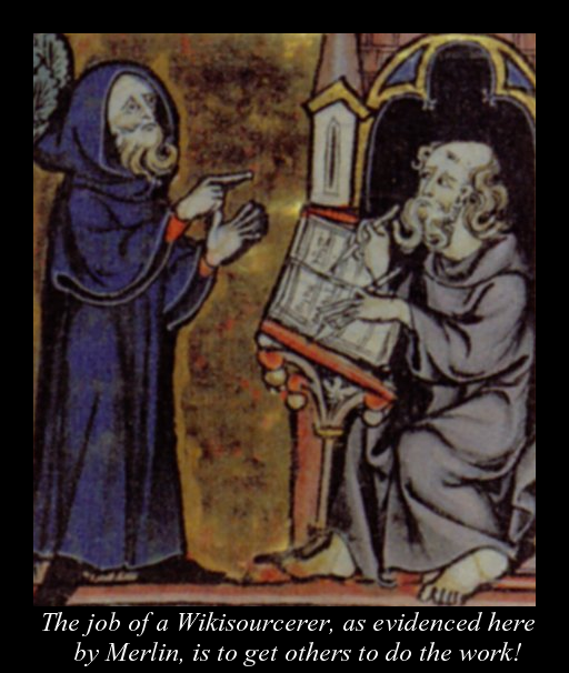 Wikisource applet